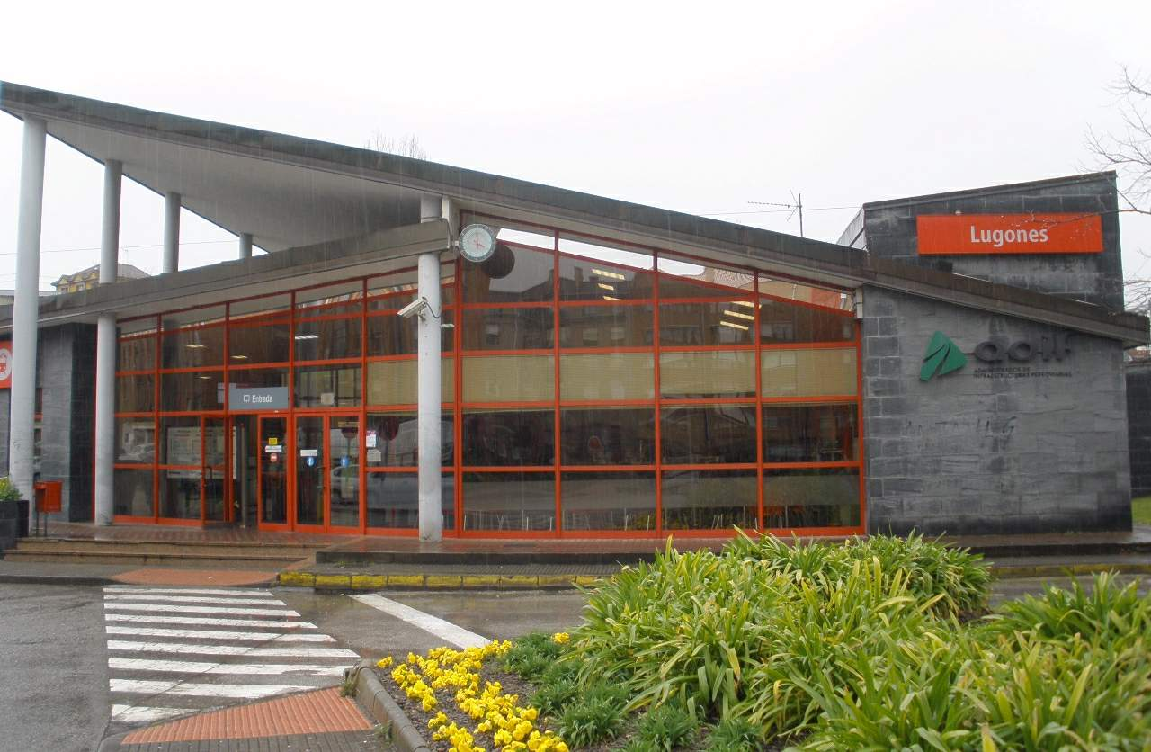 Lugones (Asturias) - Estación de Renfe Cercanias